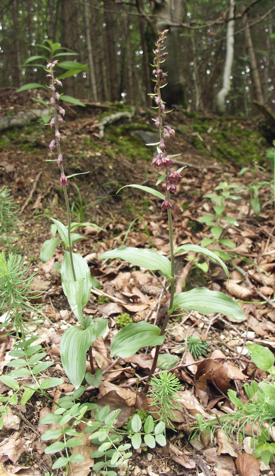 Epipactis atrorubens, Schwäbische Alb, Germany